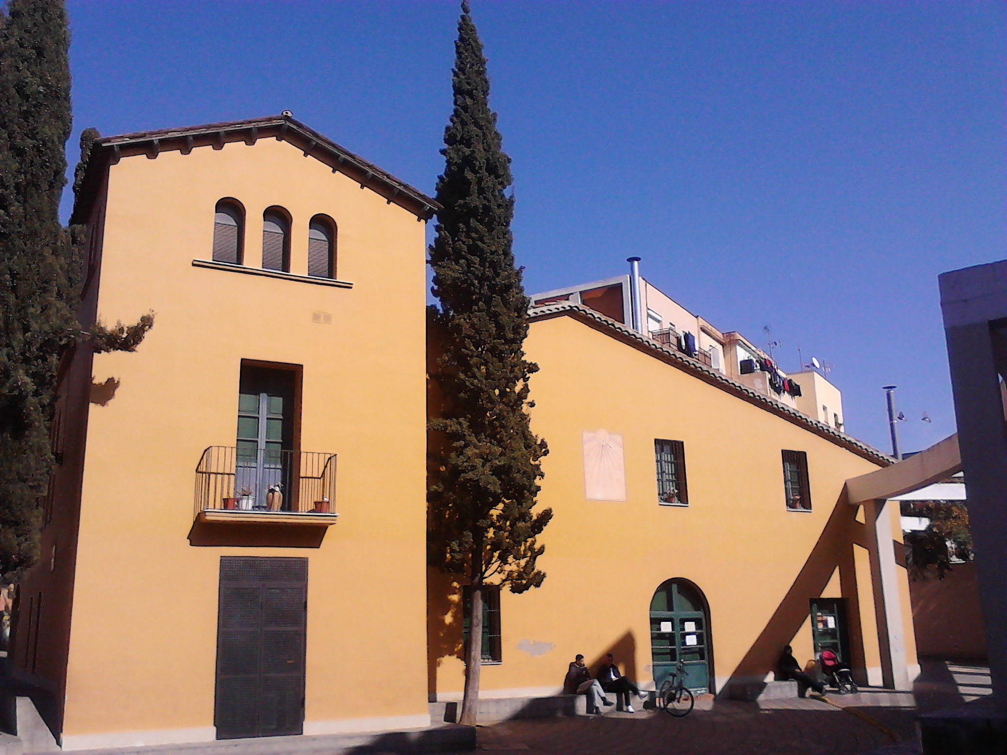 Masia de Can Mariner (Santa Coloma de Gramenet)